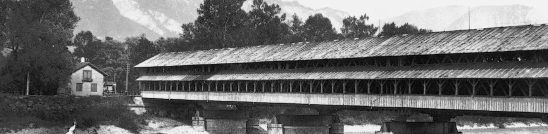 Ragazer Eisenbahnbrücke. Von 1857 bis 1928 trotzte die gedeckte Holzkonstruktion manch schwerem Rheinhochwasser und dem Funkenwurf der Dampflokomotiven von beinahe einer Million Zügen. Sie konnte ohne Geschwindigkeitsbeschränkung, das heisst mit 60 km/h, befahren werden.